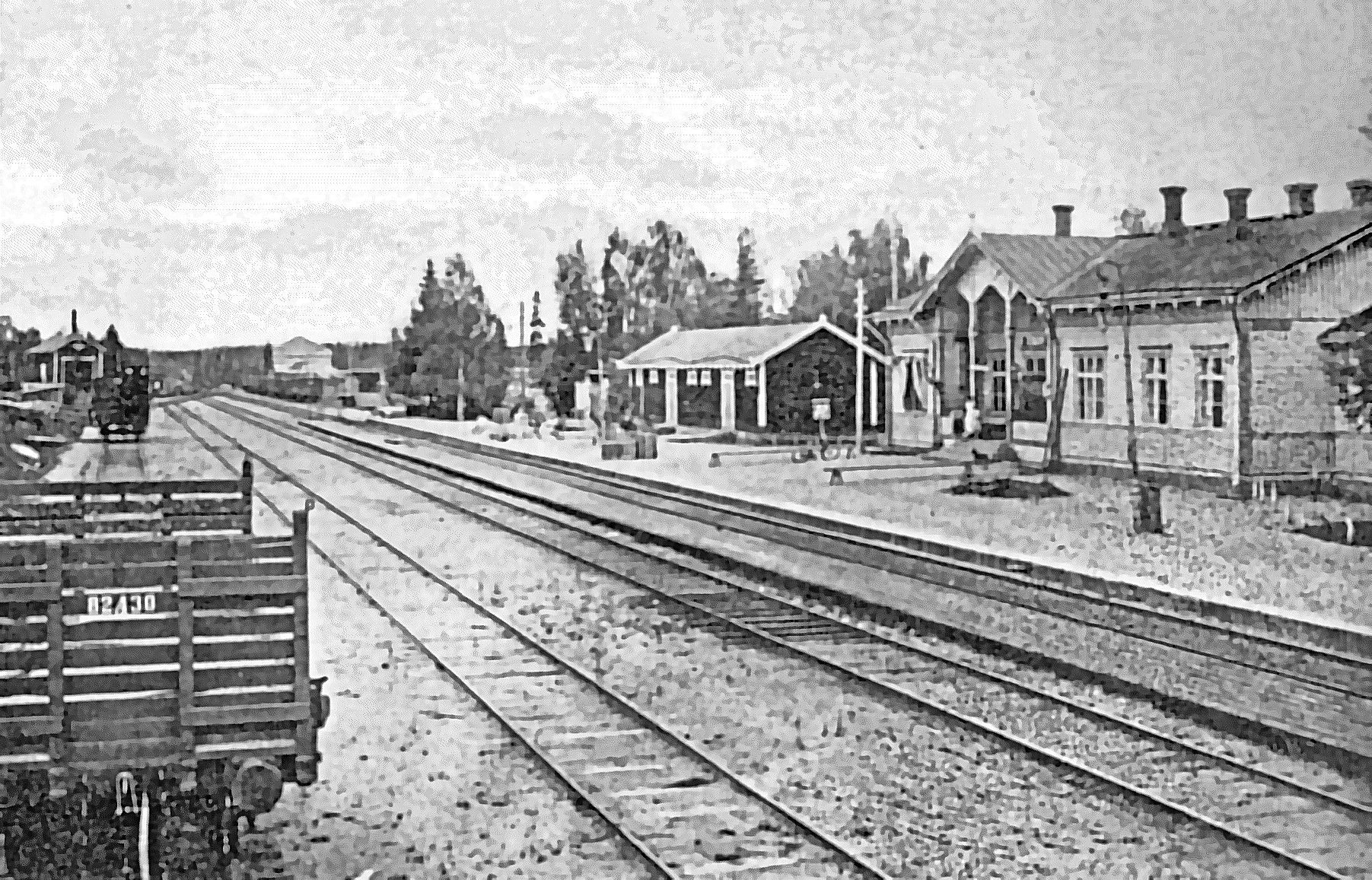 Vilppulan rautatieasema vapaussodan aikana 1918 kuvattuna.